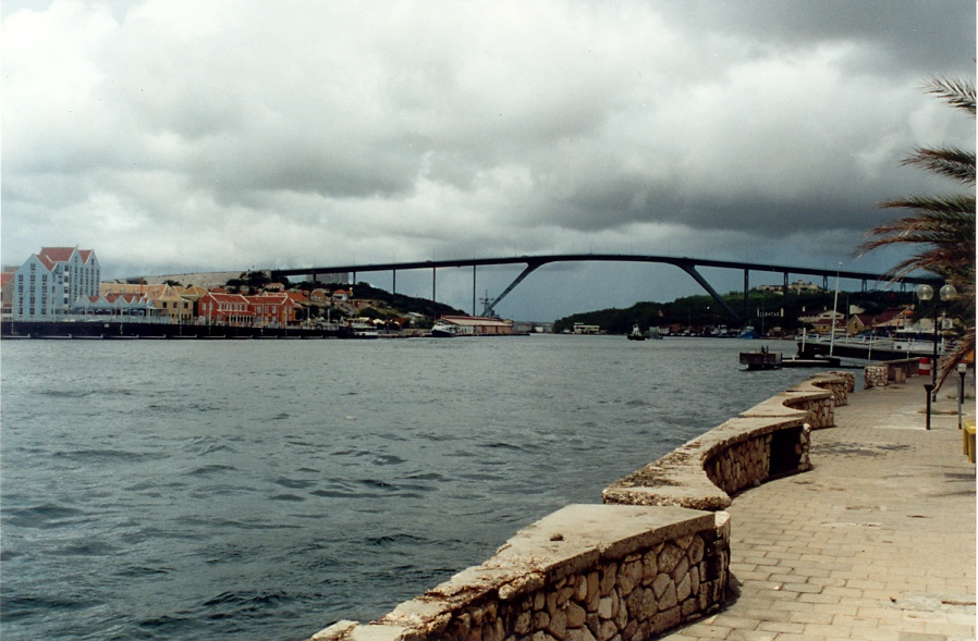 Koningin Julianabrug op Curaçao